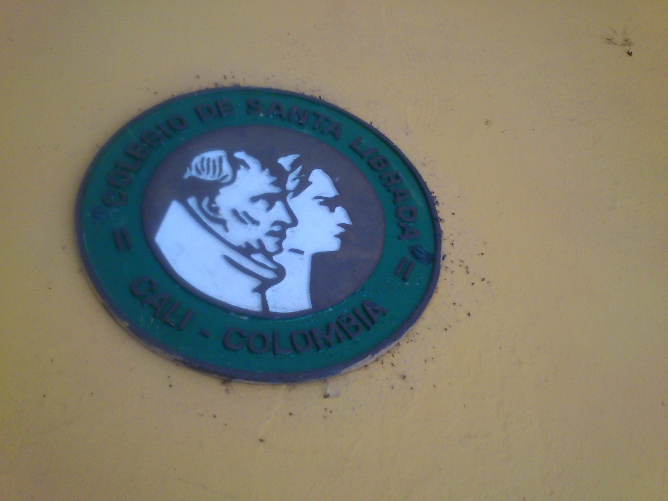 Escudo del Colegio público Santa Librada en Santiago de Cali